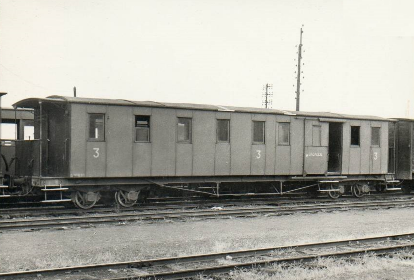 Wagon des Chemins de fer du Cambrésis à Caudry, Nord, Nord-Pas-de-Calais, France.